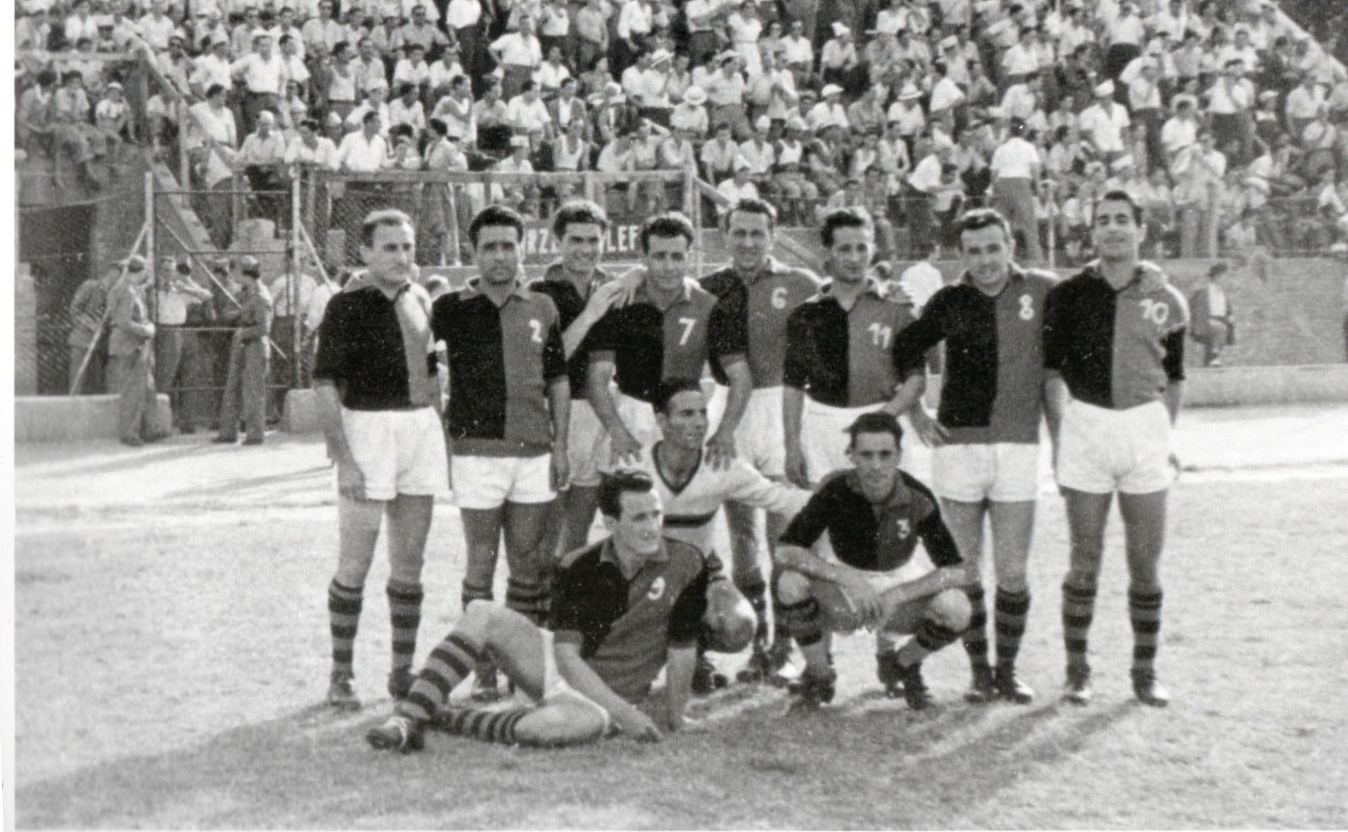 Formazione Colleferro calcio 1950-1951